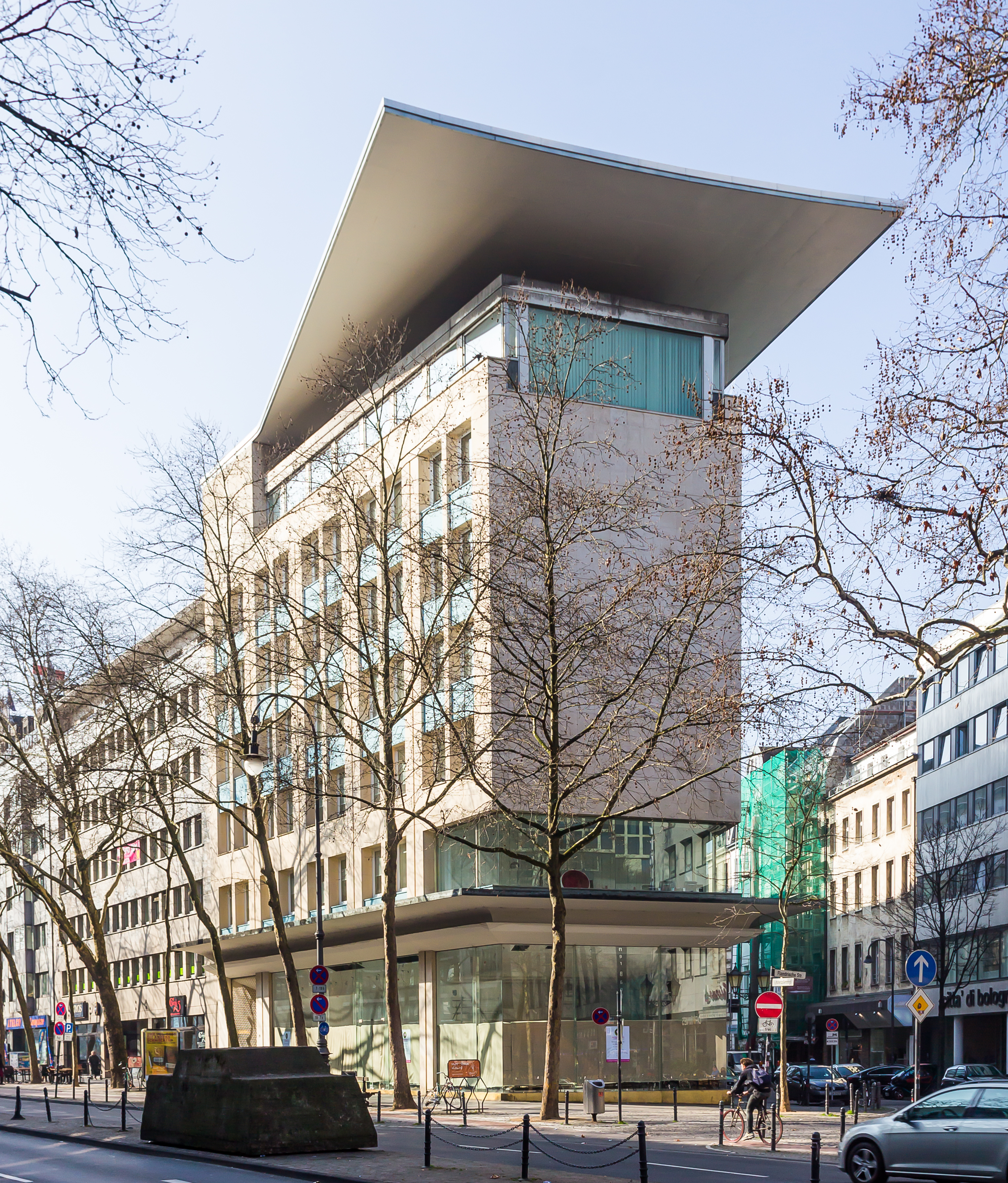 Denkmalgeschütztes Wohn- und Geschäftshaus mit Flugdach. Architekt: Hans Schilling. Am linken unteren Bildrand ist die Aktionsplastik Ruhender Verkehr zu sehen. Künstler: Wolf Vostell